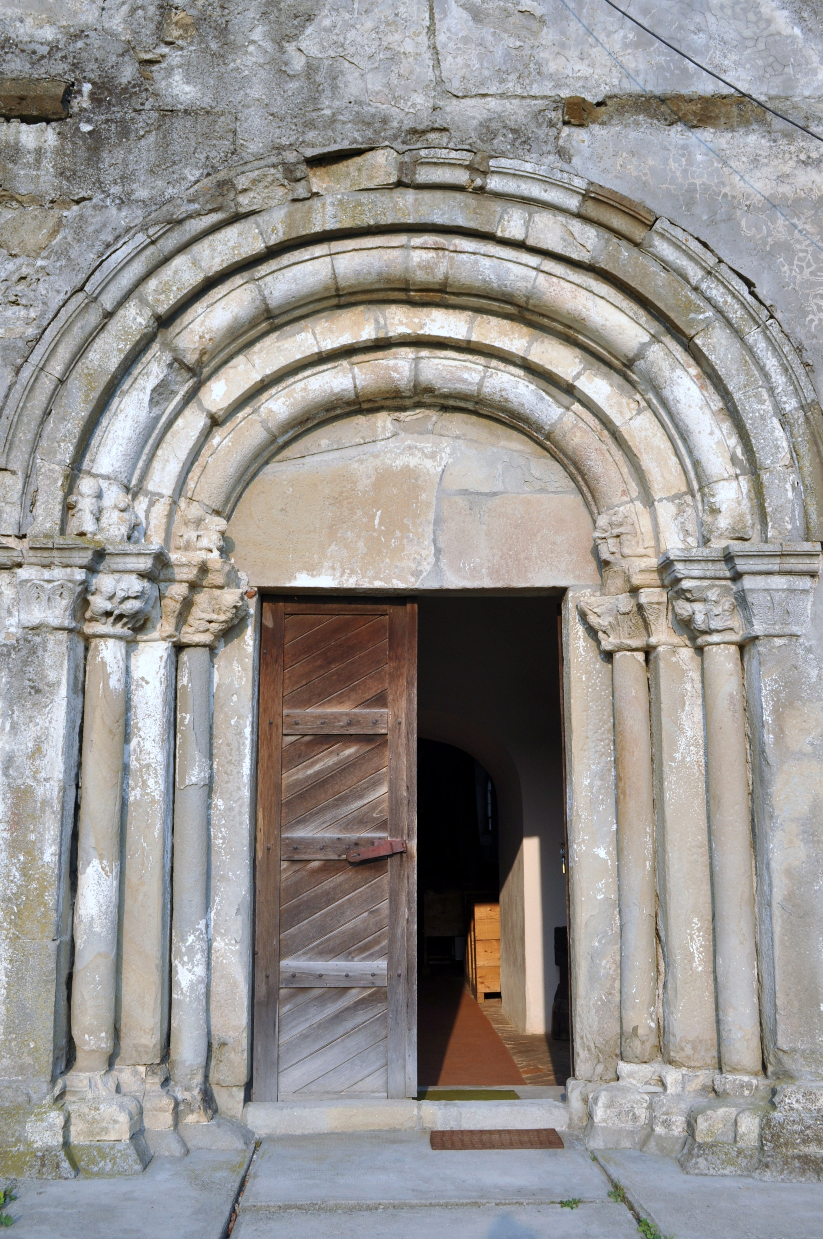 Biserica evanghelică maghiară din Săcădate, oraș Avrig